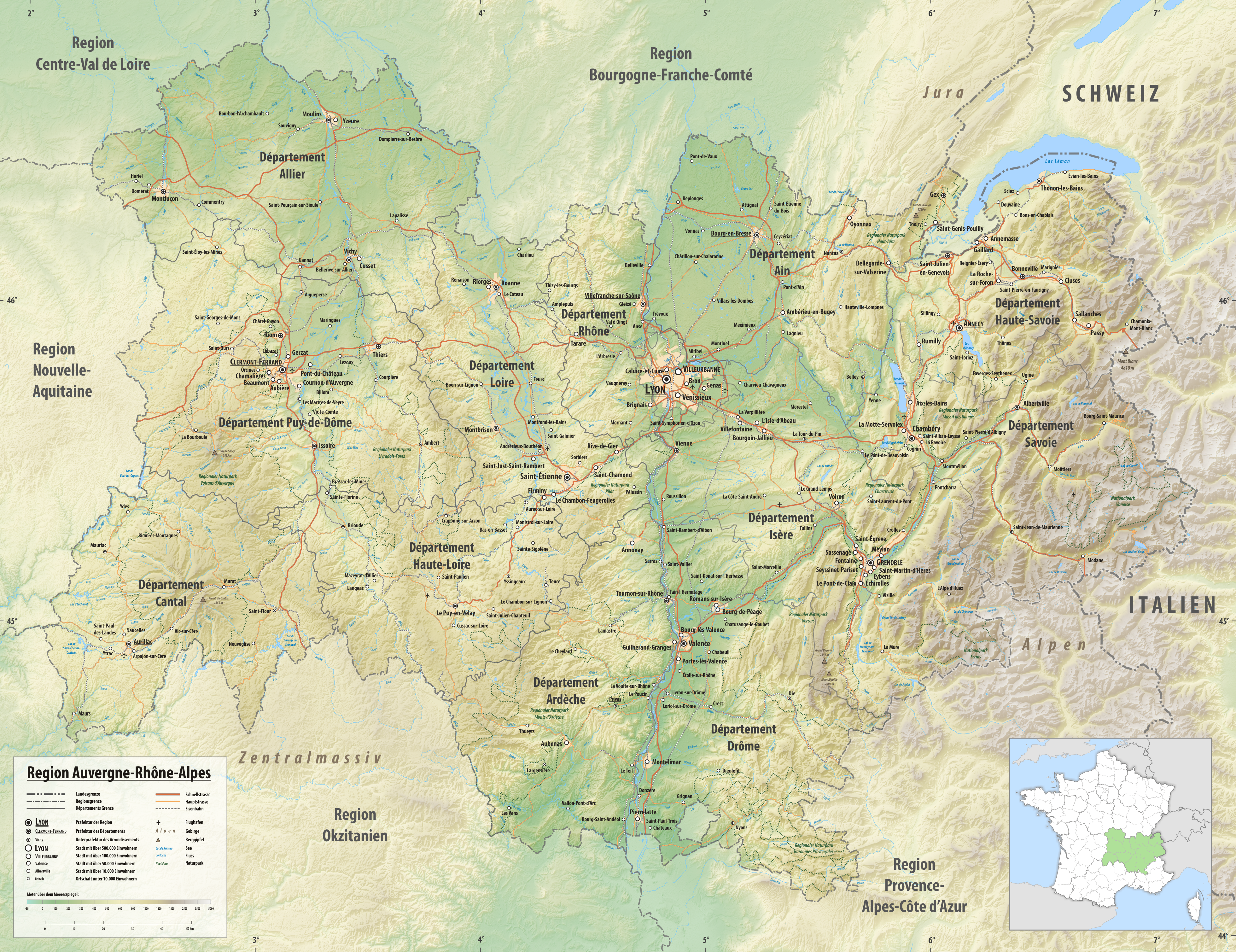 Reliefkarte der Region Auvergne-Rhône-Alpes Topographischer Hintergrund: NASA Shuttle Radar Topography Mission (public domain). SRTM3 v.2.